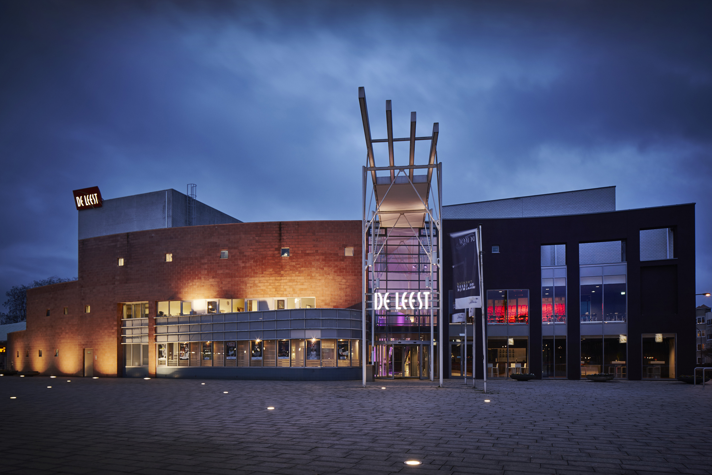 Theater De Leest aan het Vredesplein in Waalwijk